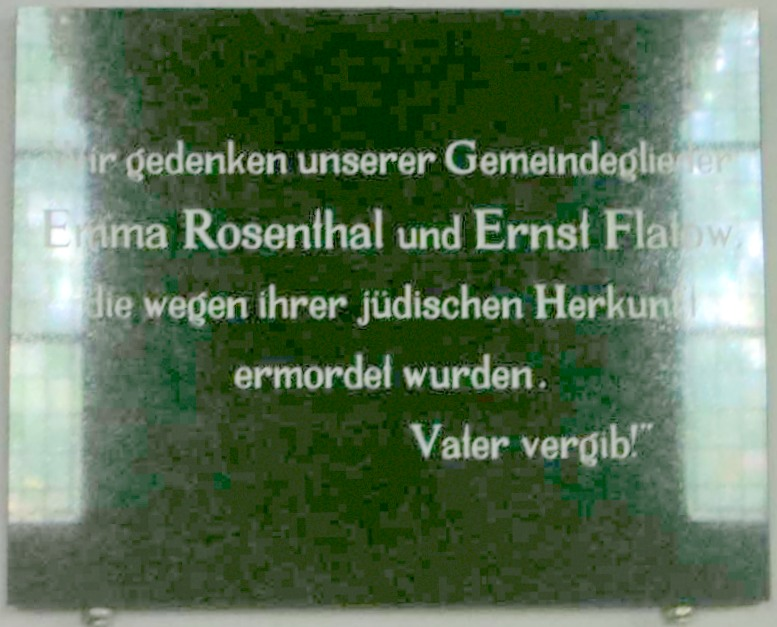 Gedenktafel für den judenchristlichen Pfarrer Ernst Flatow in der Kirche von Hohen Neuendorf, der in diesem Ort 1941 von einem Ehepaar beherbergt wurde